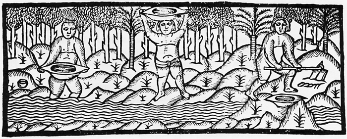 Grabado de indios lavando arenas auríferas tomado de una edición de la Historia General y Natural de las Indias de Gonzalo Fernández de Oviedo, donde el autor relataba a Carlos V los usos y costumbres de indios caribes quienes buscaban oro y perlas en ríos y mares en la época del descubrimiento y conquista de América